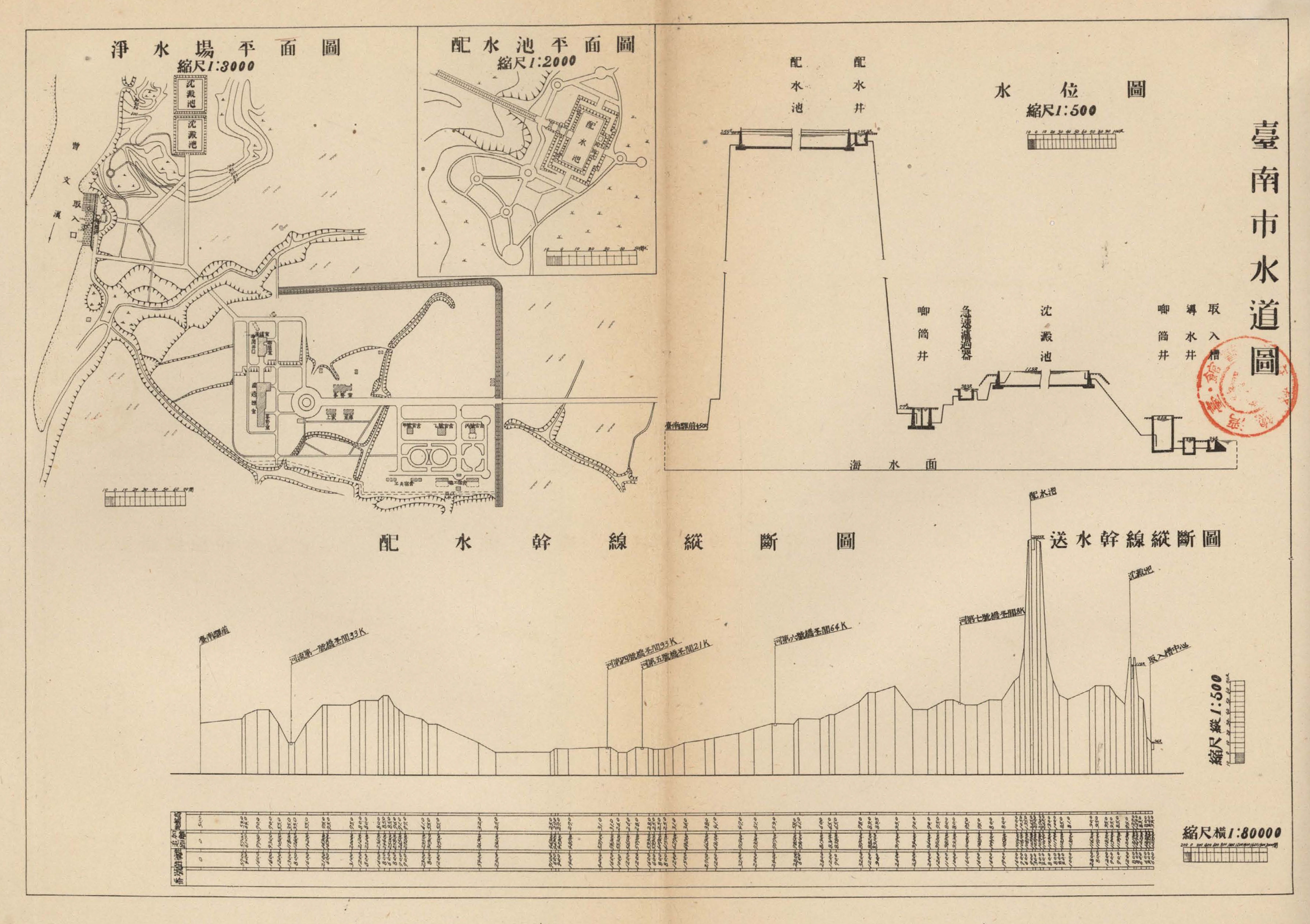 中文（台灣）: 台南市水道圖